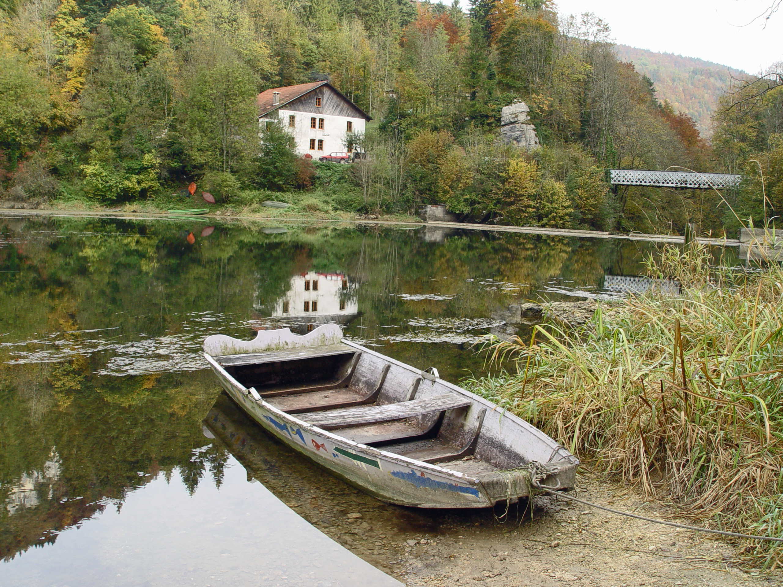 Le Doubs in der Nähe von La Goule an der schweizerisch-französischen Grenze